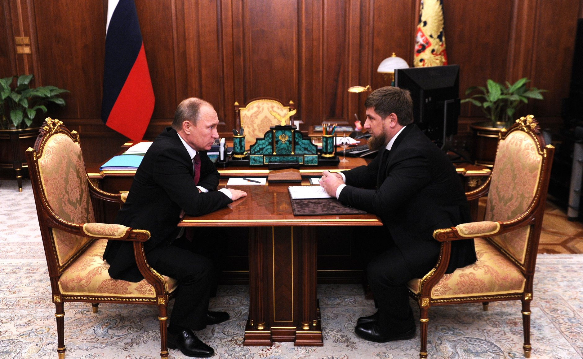 Президент России Владимир Путин с главой Чеченской Республики Рамзаном Кадыровым